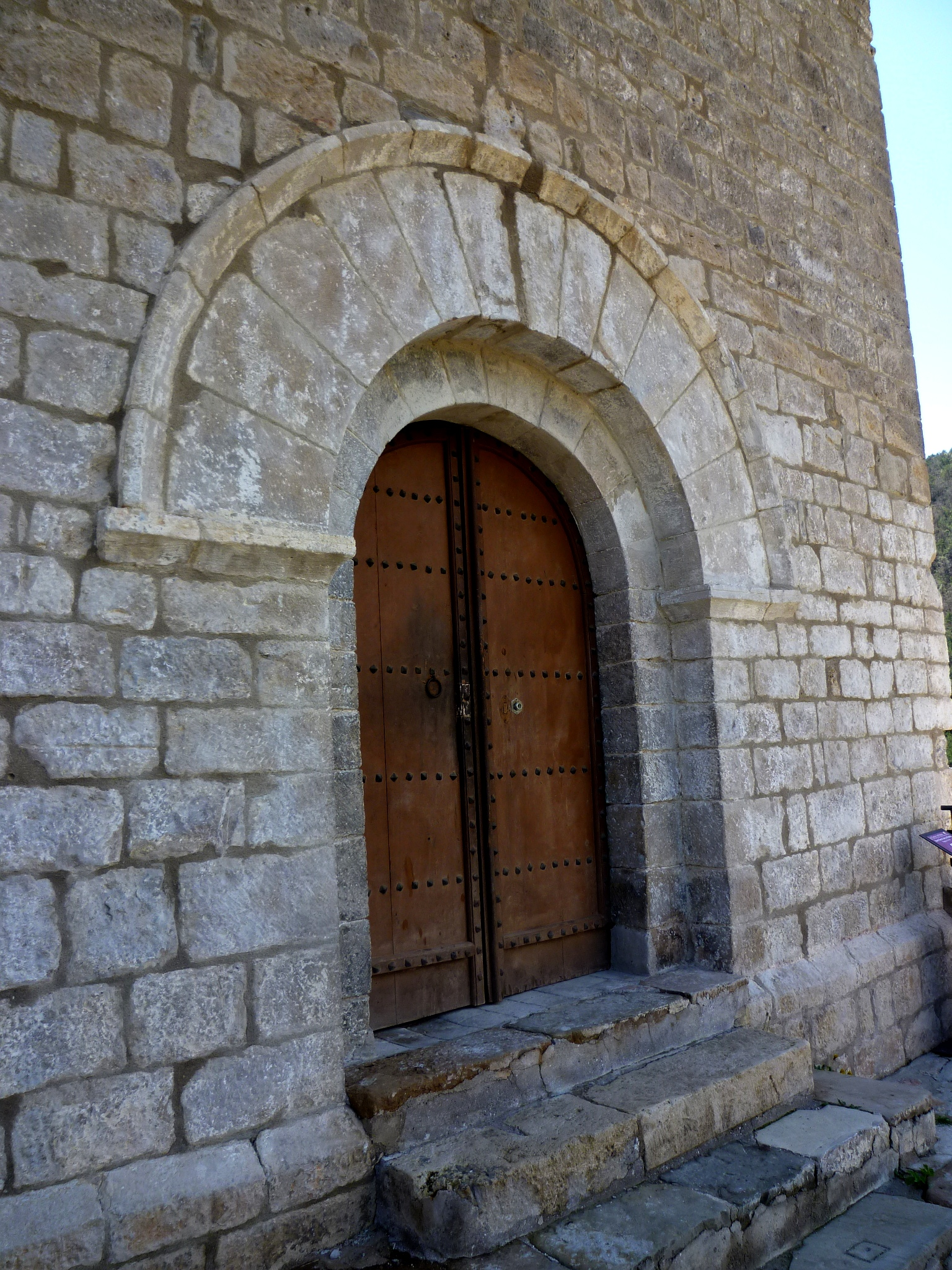 Església de Sant Serni o Sant Sadurní de la Pedra (la Coma i la Pedra): portal